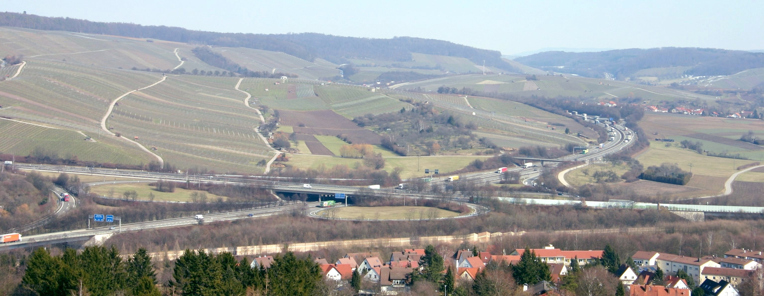 Das Weinsberger Autobahnkreuz von der Burgruine Weibertreu aus